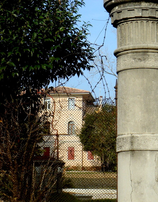 Colle Umberto (Treviso, Italia): Villa Ninetta Lucheschi, scorcio della facciata in stile liberty dai pilastri d'ingresso.